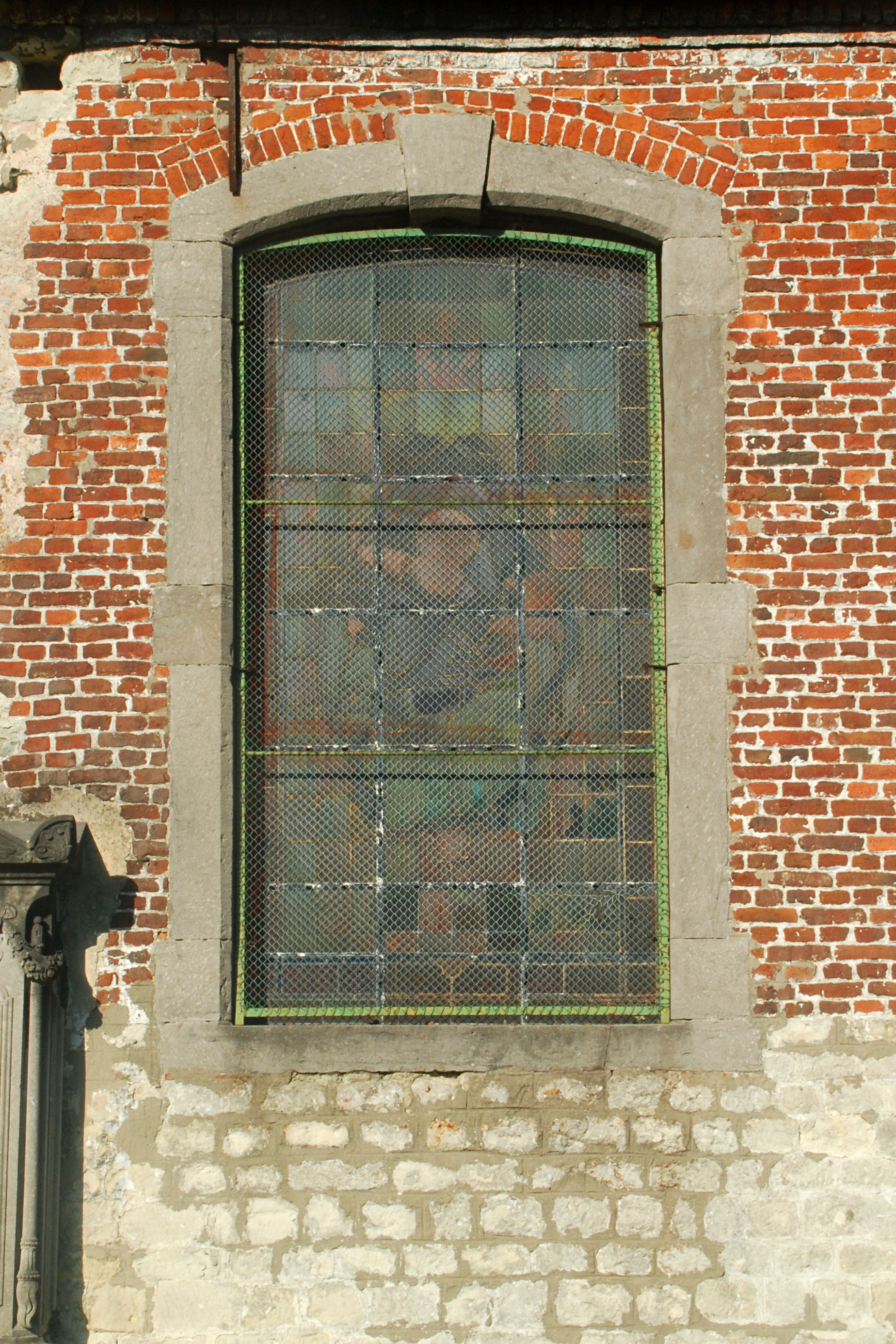 Belgique - Brabant wallon - Nivelles - Eglise Sainte-Marguerite de Thines